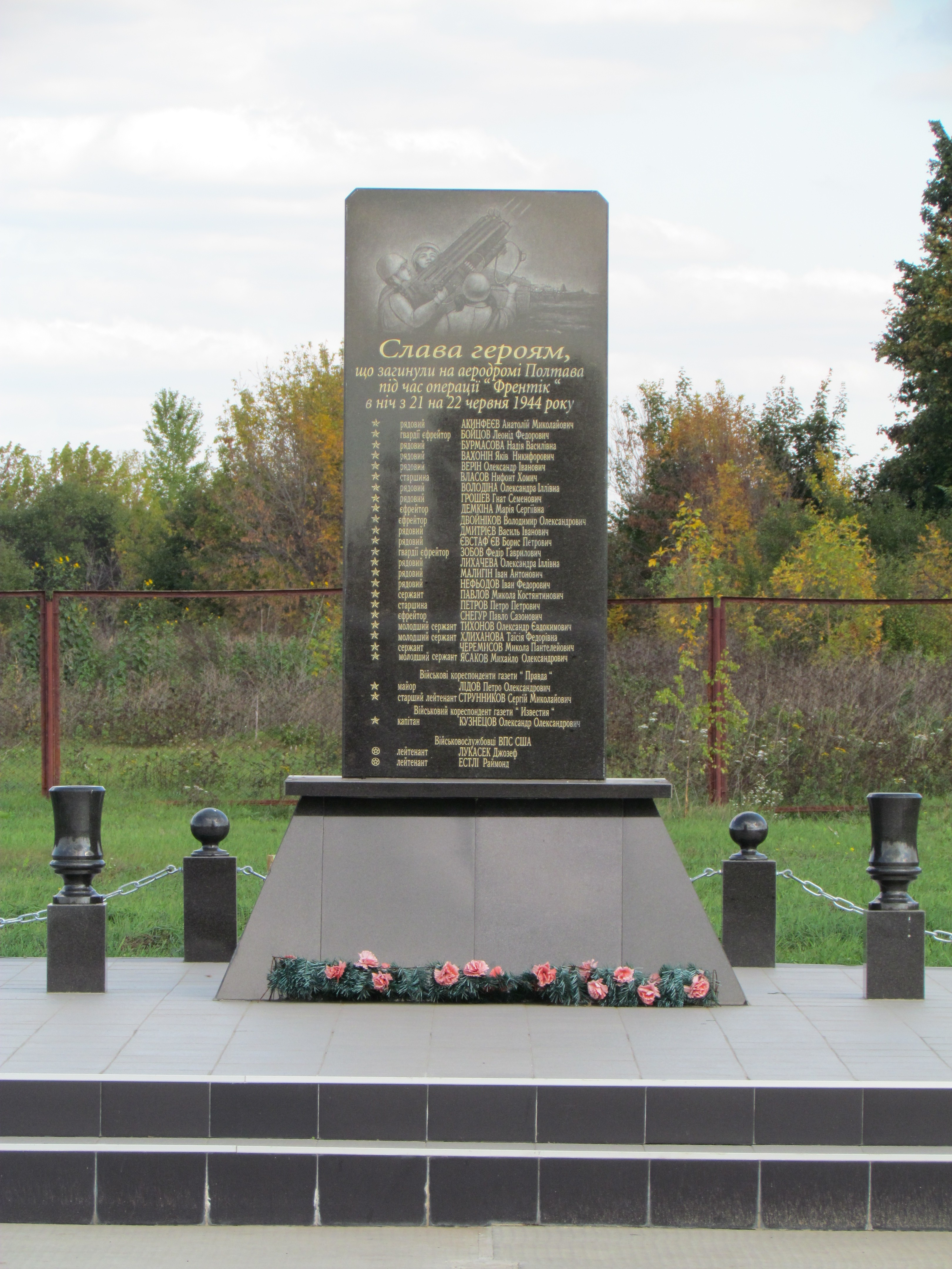 Пам’ятний знак на честь 50-річчя проведення операції “Френтік”.